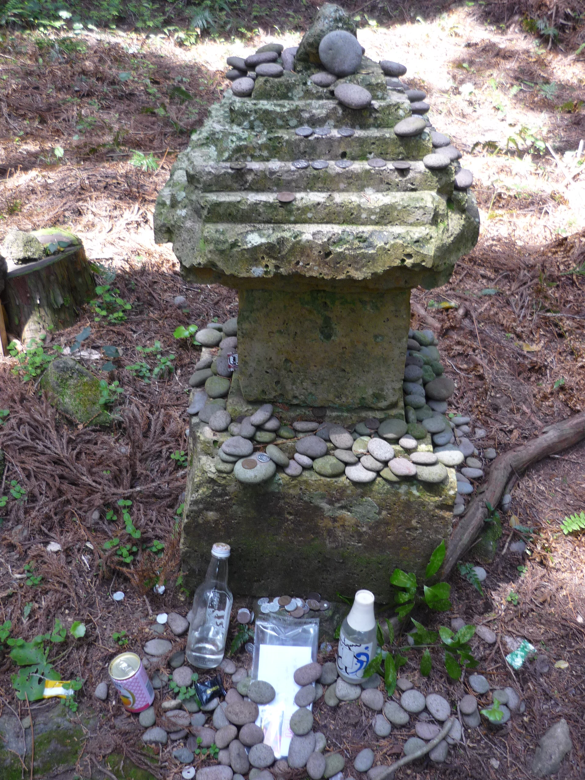 薩摩半島頴娃の伝真田幸村の墓 - 雪丸バス停より徒歩